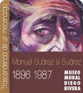 invitacion a exposicion manuel Suárez